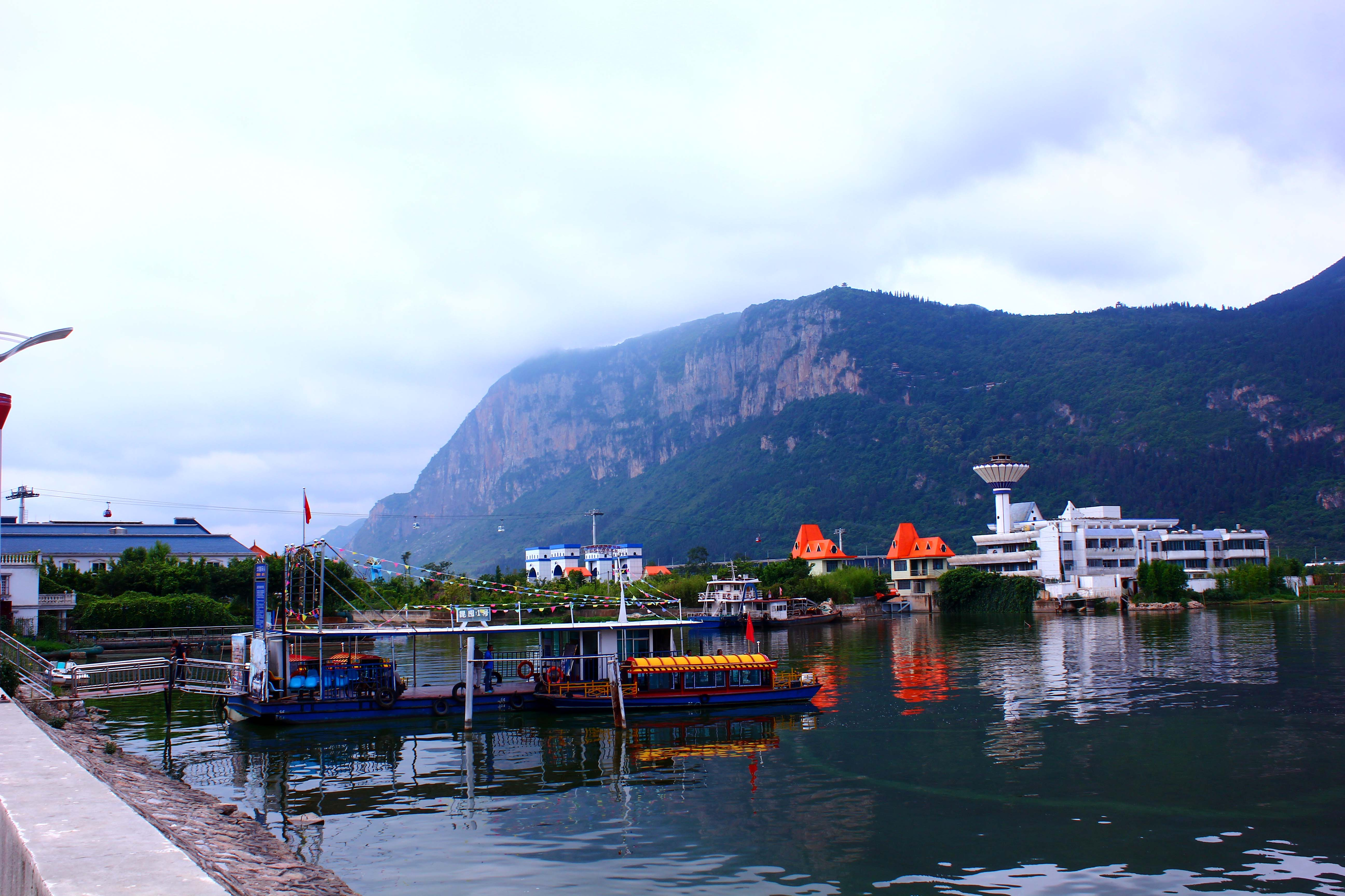 昆明西山罗汉山的悬崖峭壁，拍摄于草海大坝